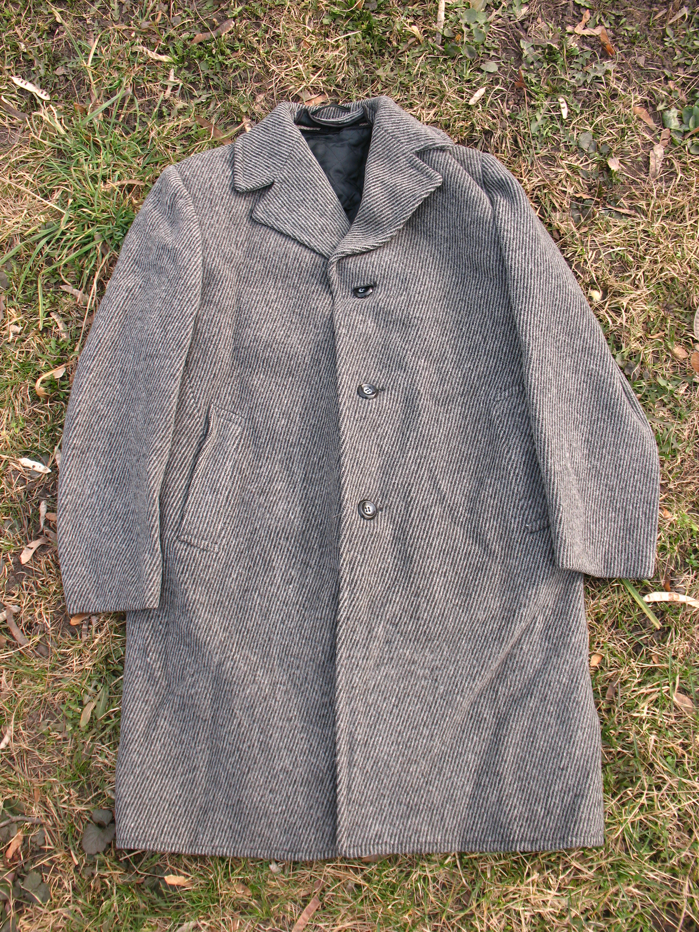 Демисезонное мужское пальто (ГДР). Размер 52 (104), рост 176 (5-й), цена 53 марки ГДР.